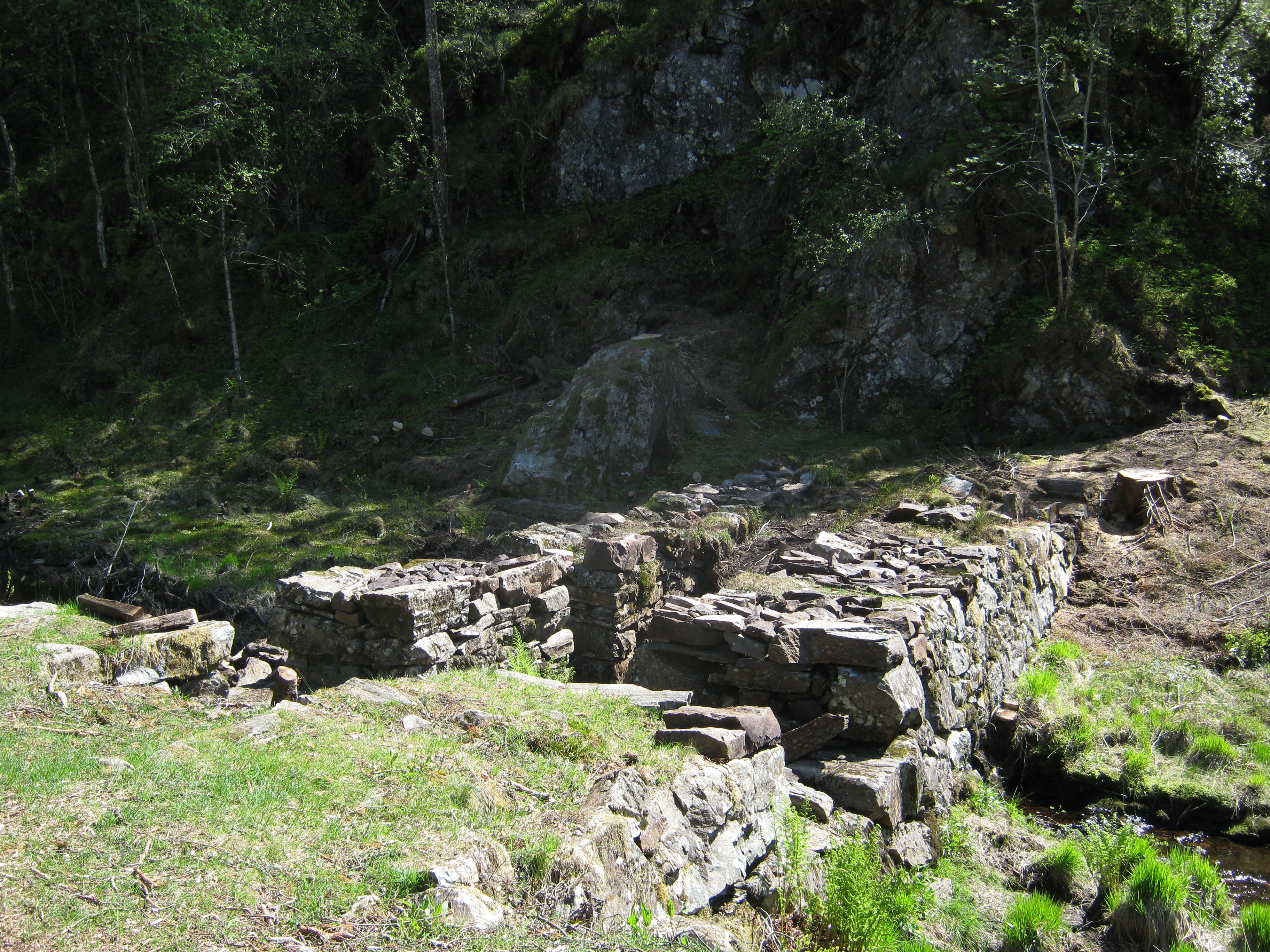 Rester av en gammel stemme (demning) i skogen på Haugland, Askøy.